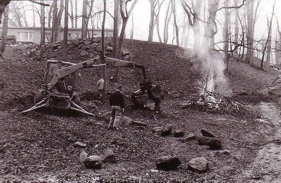 Wiederherstellung des Schlangenweges im Landschaftspark Althaldebnsleben-Hundisburg, 1983